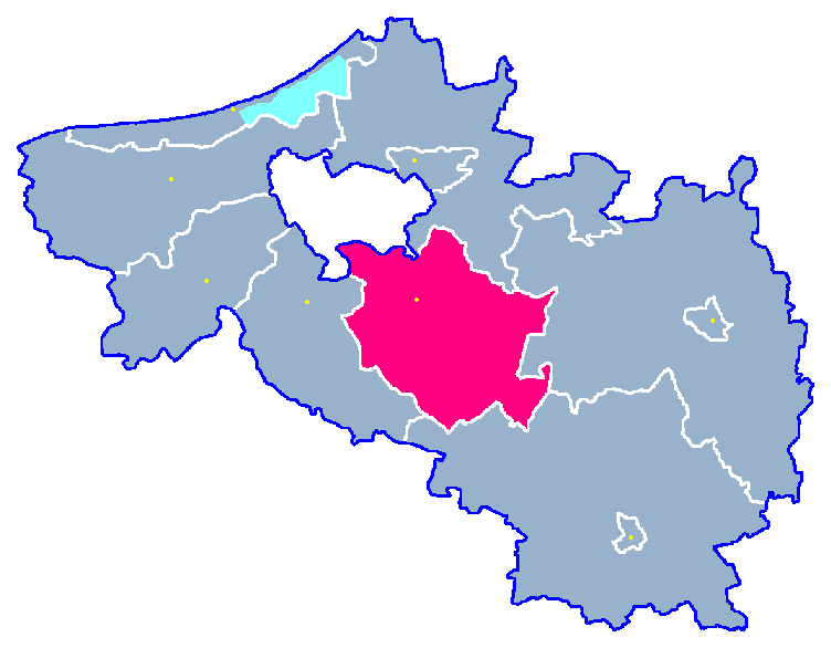 Locator maps for communes in województwo zachodniopomorskie : Manowo gm.png (podział na gminy)